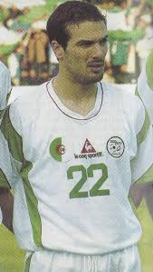 Hocine Achiou